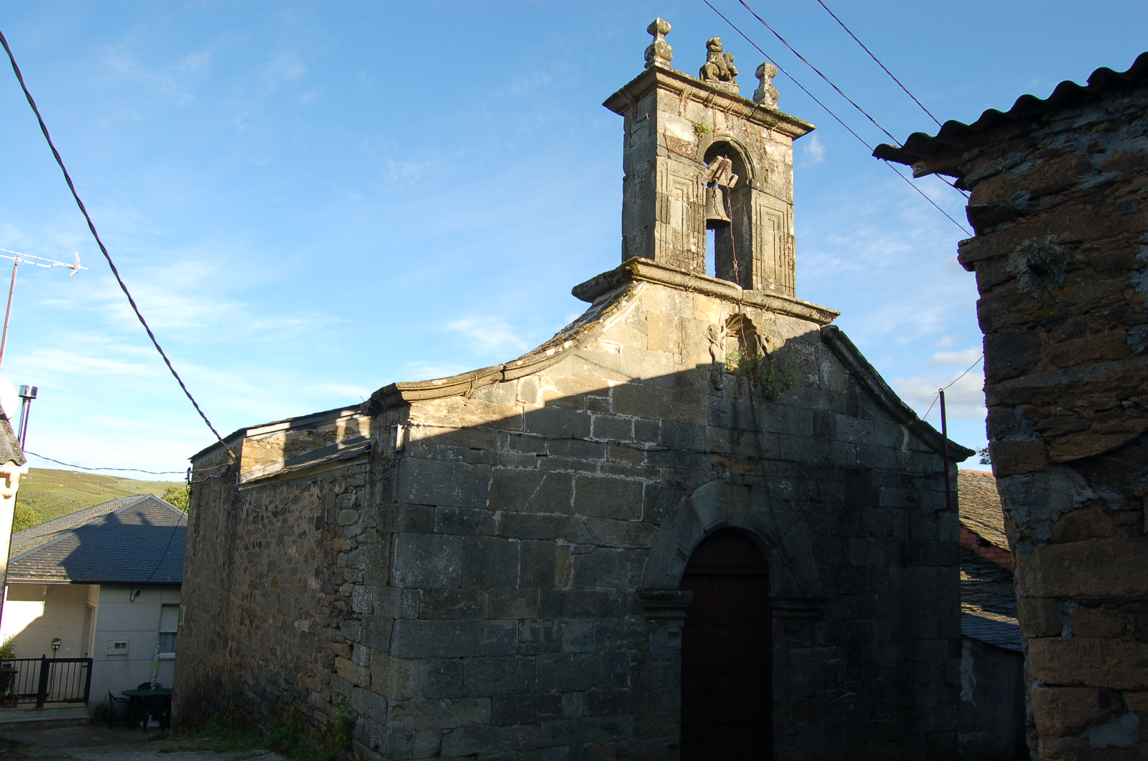 Igrexa parroquial de Santiago de Carracedo da Serra